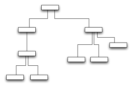 תרשים היררכיה ארגונית נוצר על ידי באמצעות תוכנת OmniGraph, משוחרר לפי כללי הוויקיפדיה Xslf 21:34, 4 יולי 2004 (UTC)